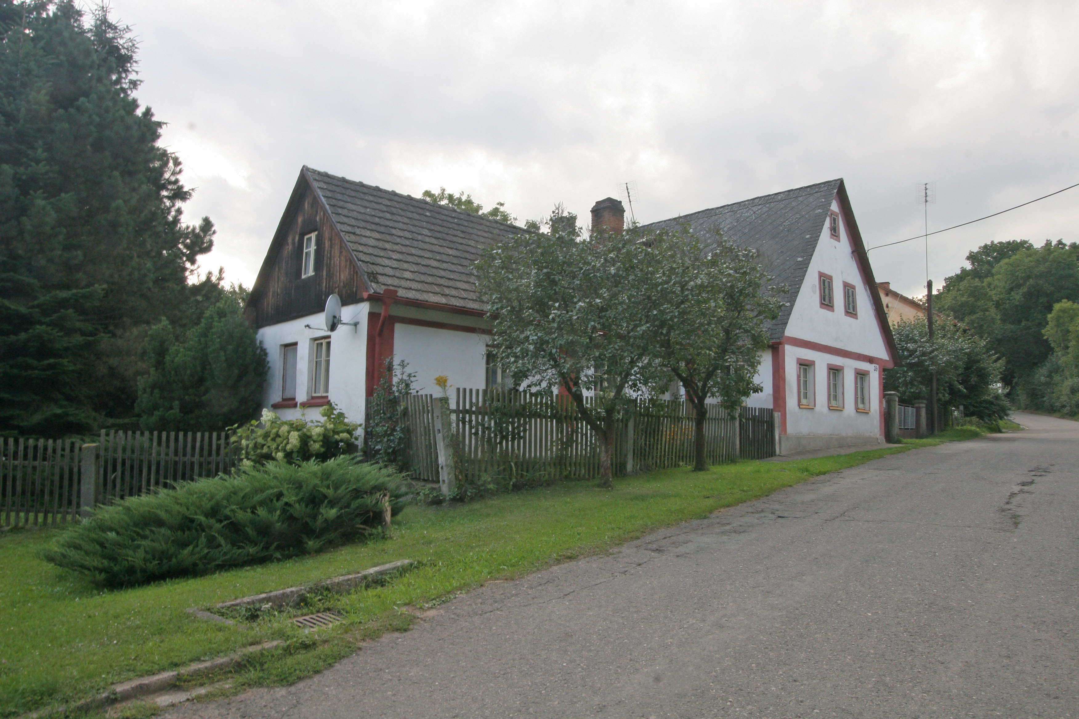 Slotov čp. 39